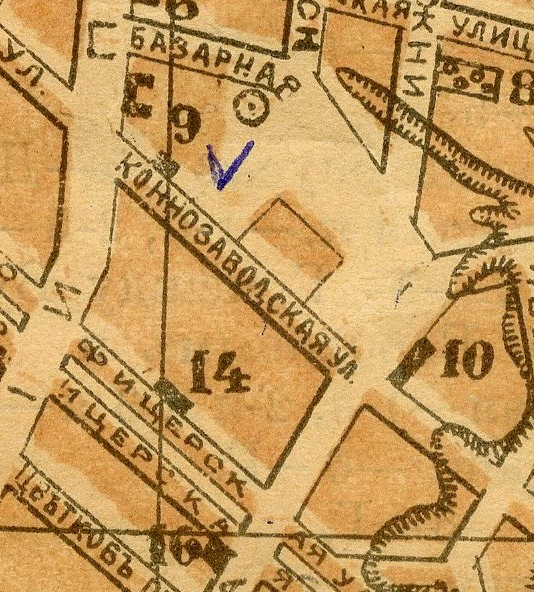 Беларуская (тарашкевіца): Магілёў (Магілёў). Плян места